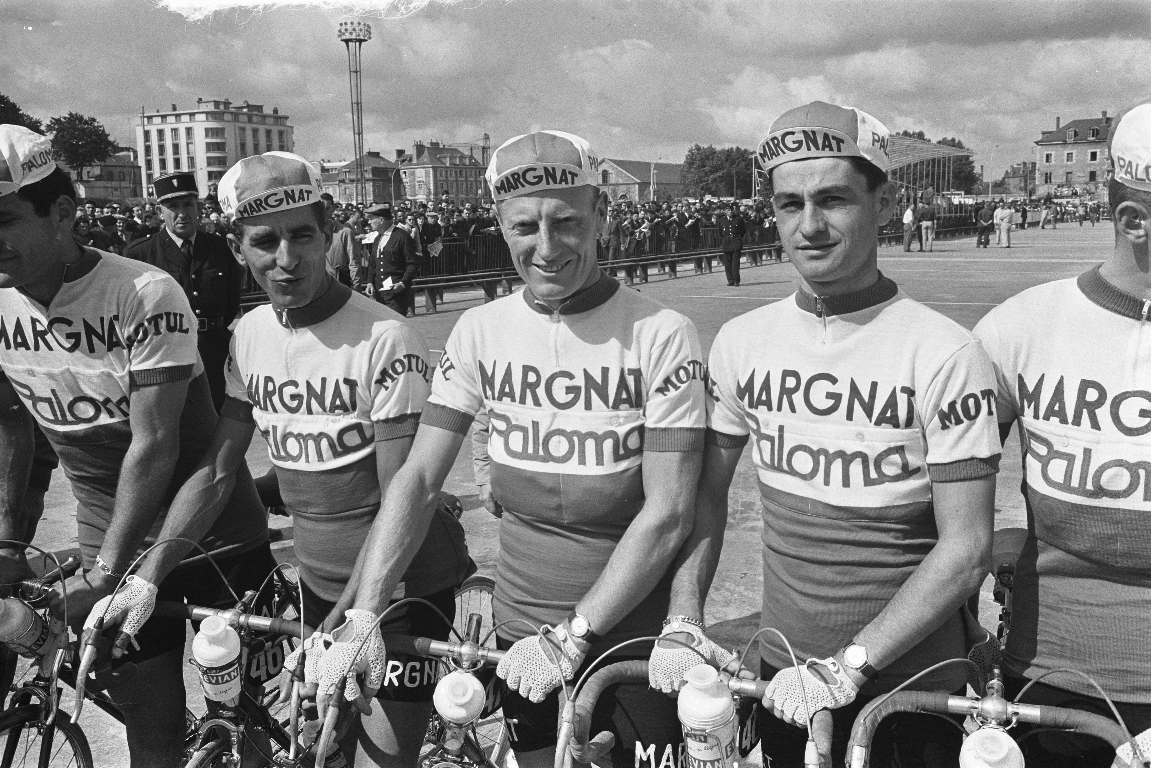 51ste Tour de France 1964, de ploeg van Margnat met in midden Andre Darrigade.